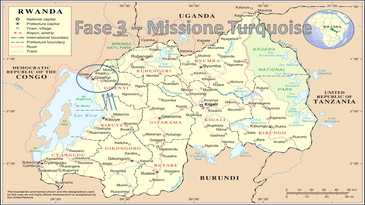 Fase 2 Operazione Turquoise